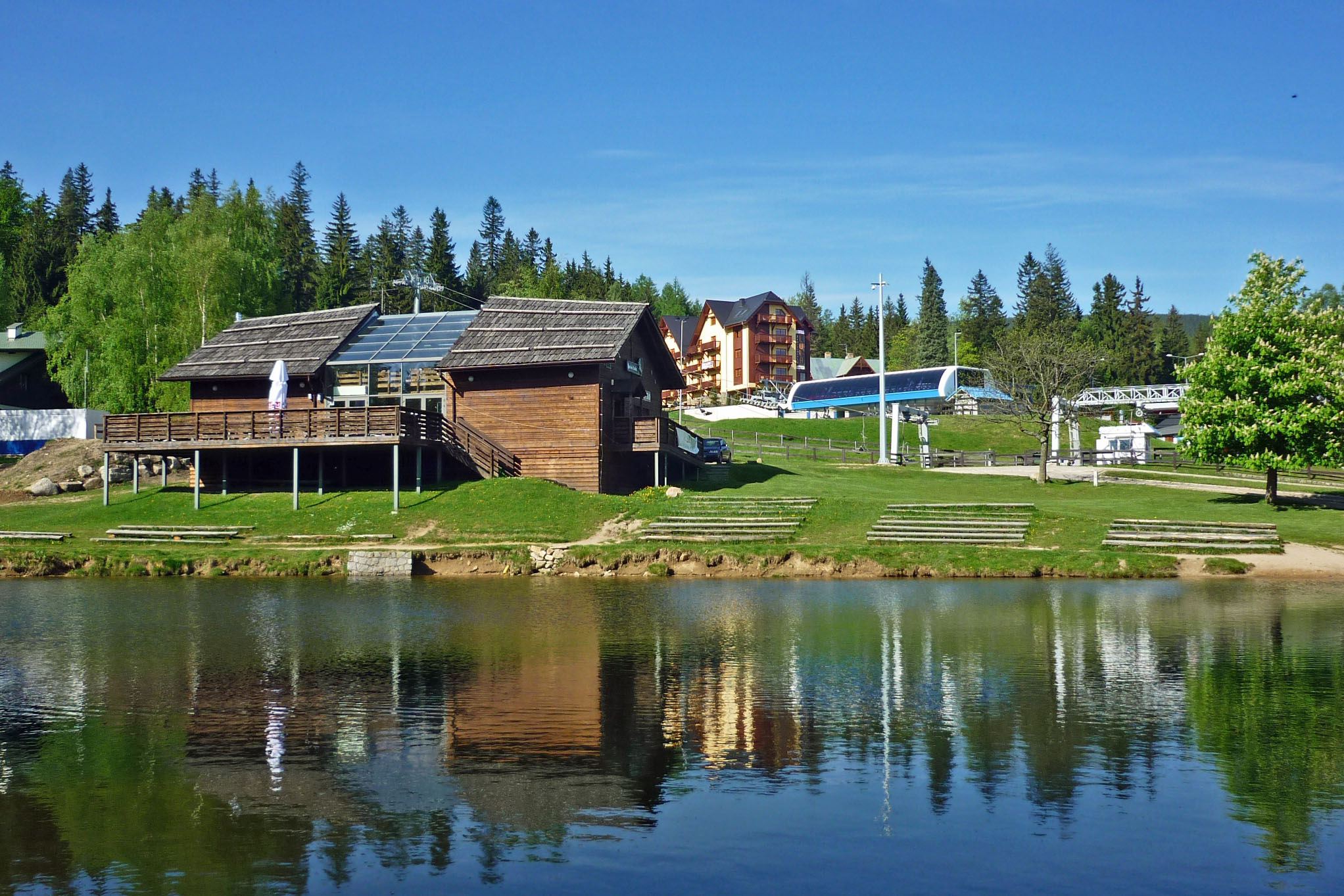 Szklarska Poręba Marysin (Schreiberhau-Mariental im Riesengebirge) - kleiner Teich an der Sessellift-Station